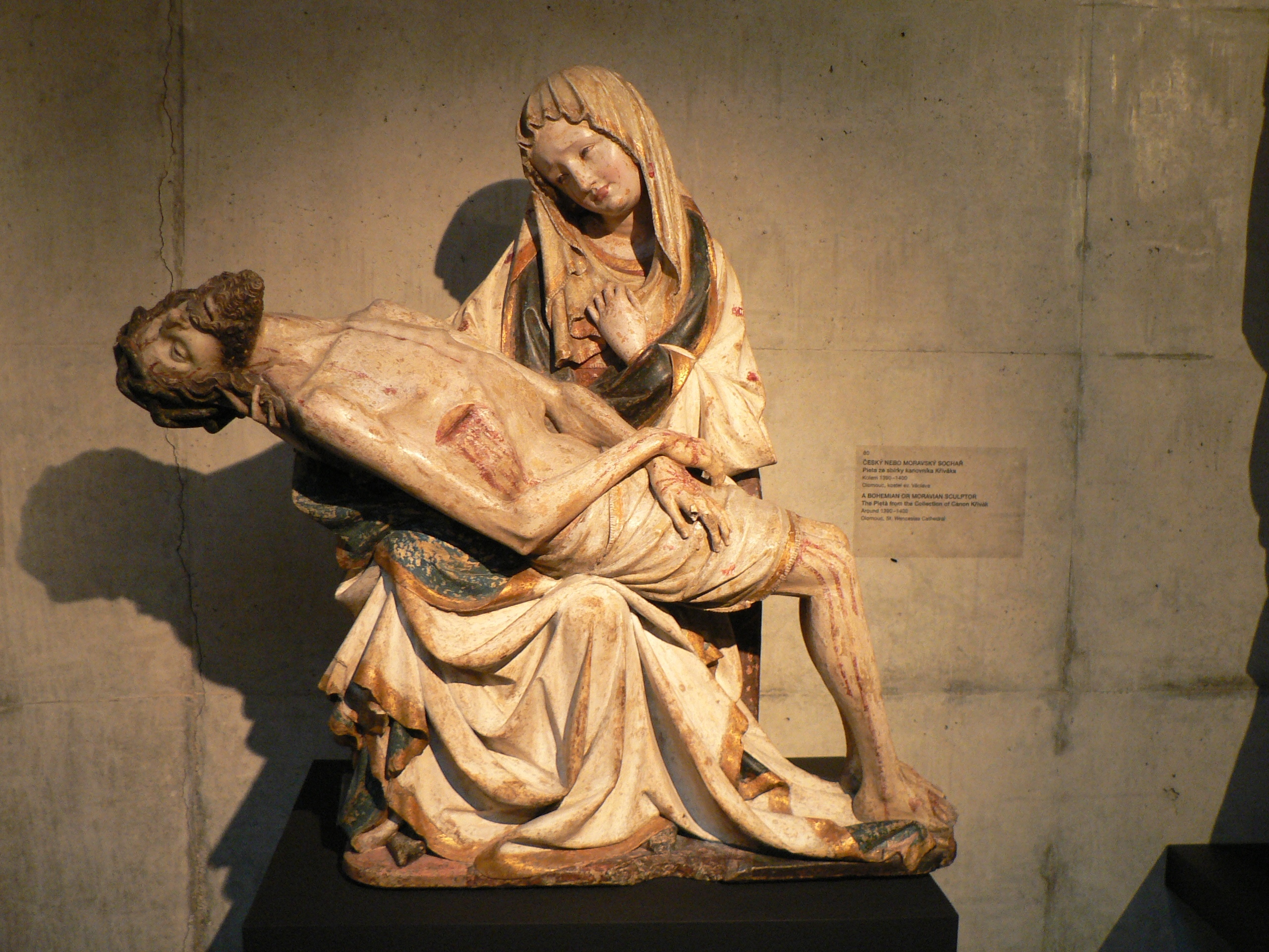 Tzv. Křivákova Pieta, 1390-1400, Arcidiecézní muzeum v Olomouci